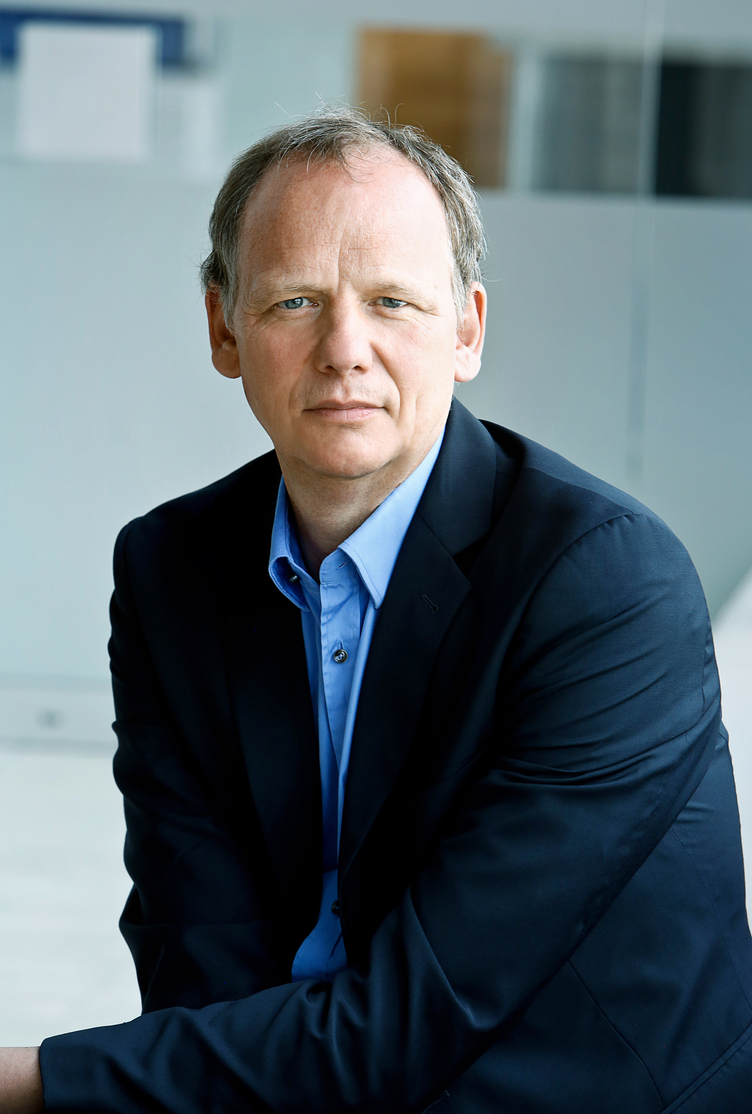 Portraitfoto des aktuellen Intendanten des Schauspiel Frankfurt Anselm Weber